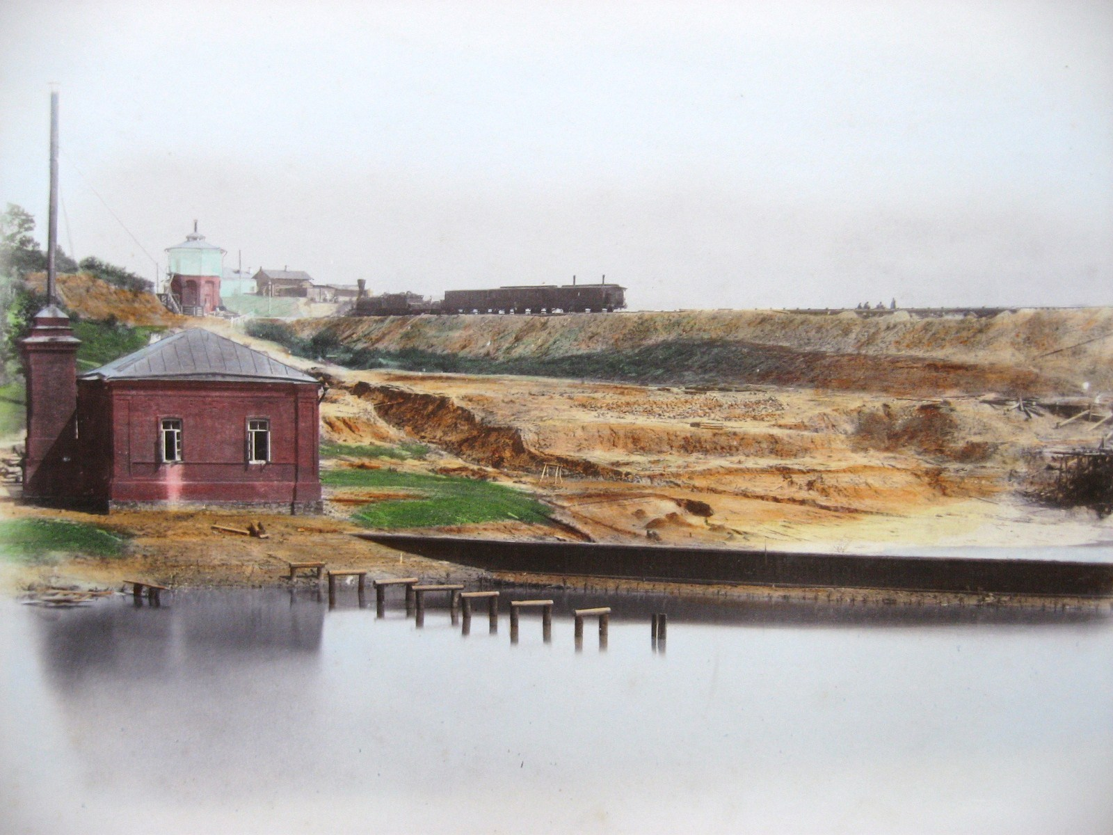 Полустанок Свинская